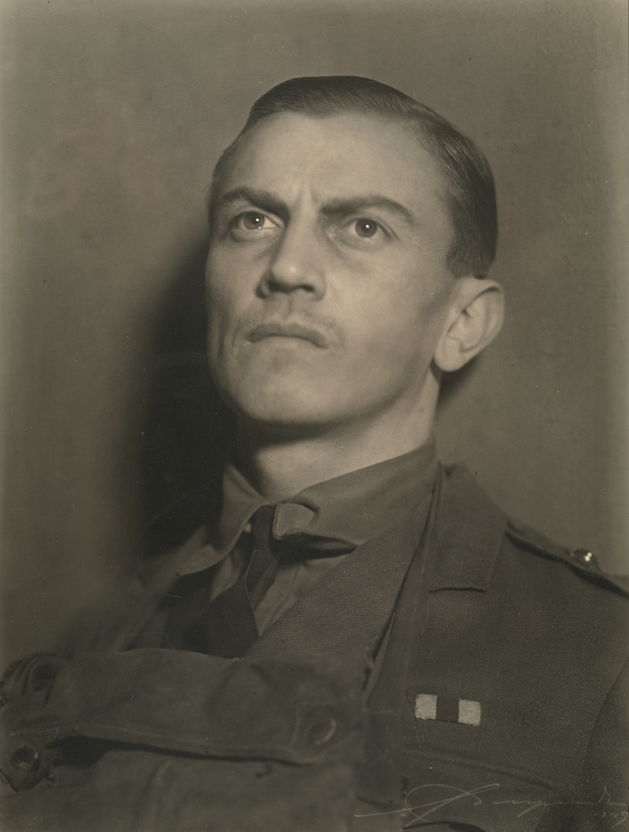 Odd Frogg i Reisen slutt